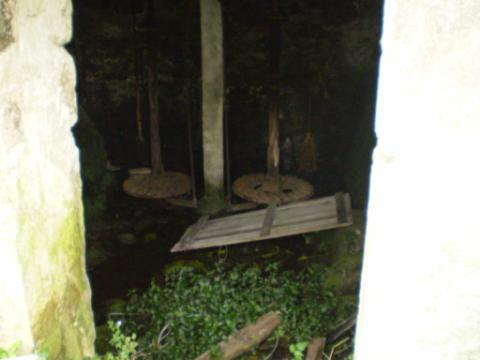 O Muíño de Gervasio en Xove.